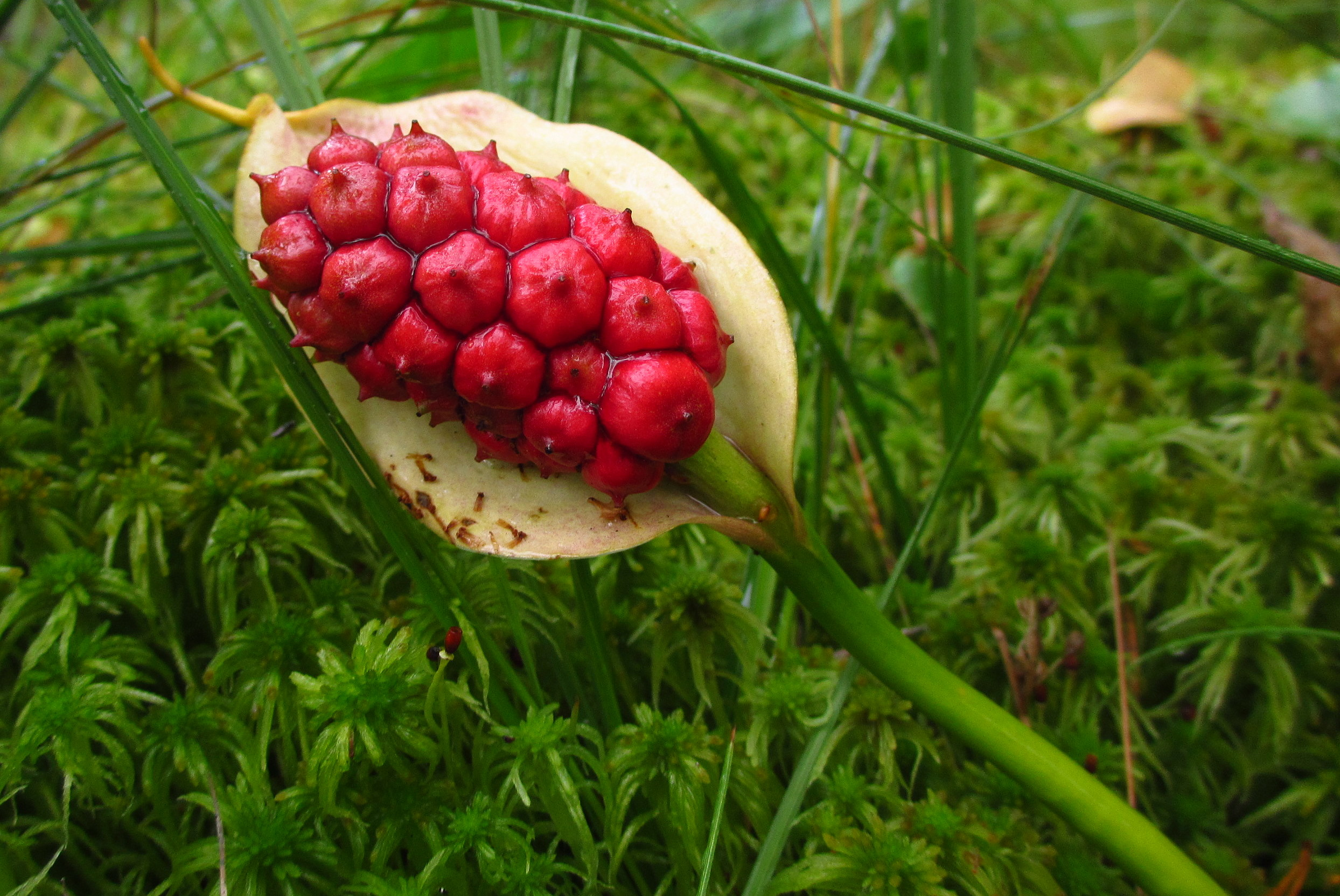 Soovõha valminud vilikond Aabla rabas